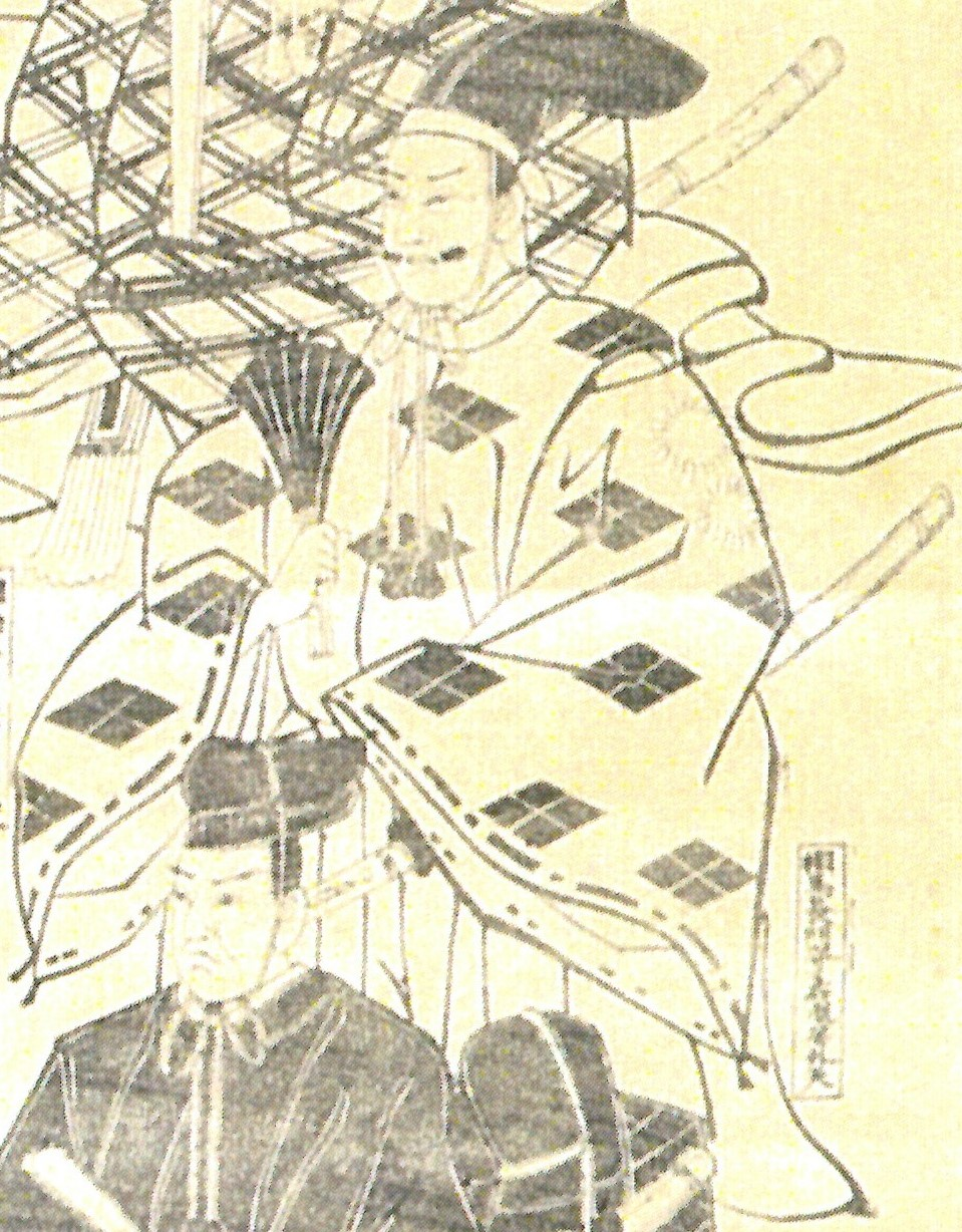 相馬家15代当主相馬盛胤の画像(「相馬家歴代藩主像」より)。